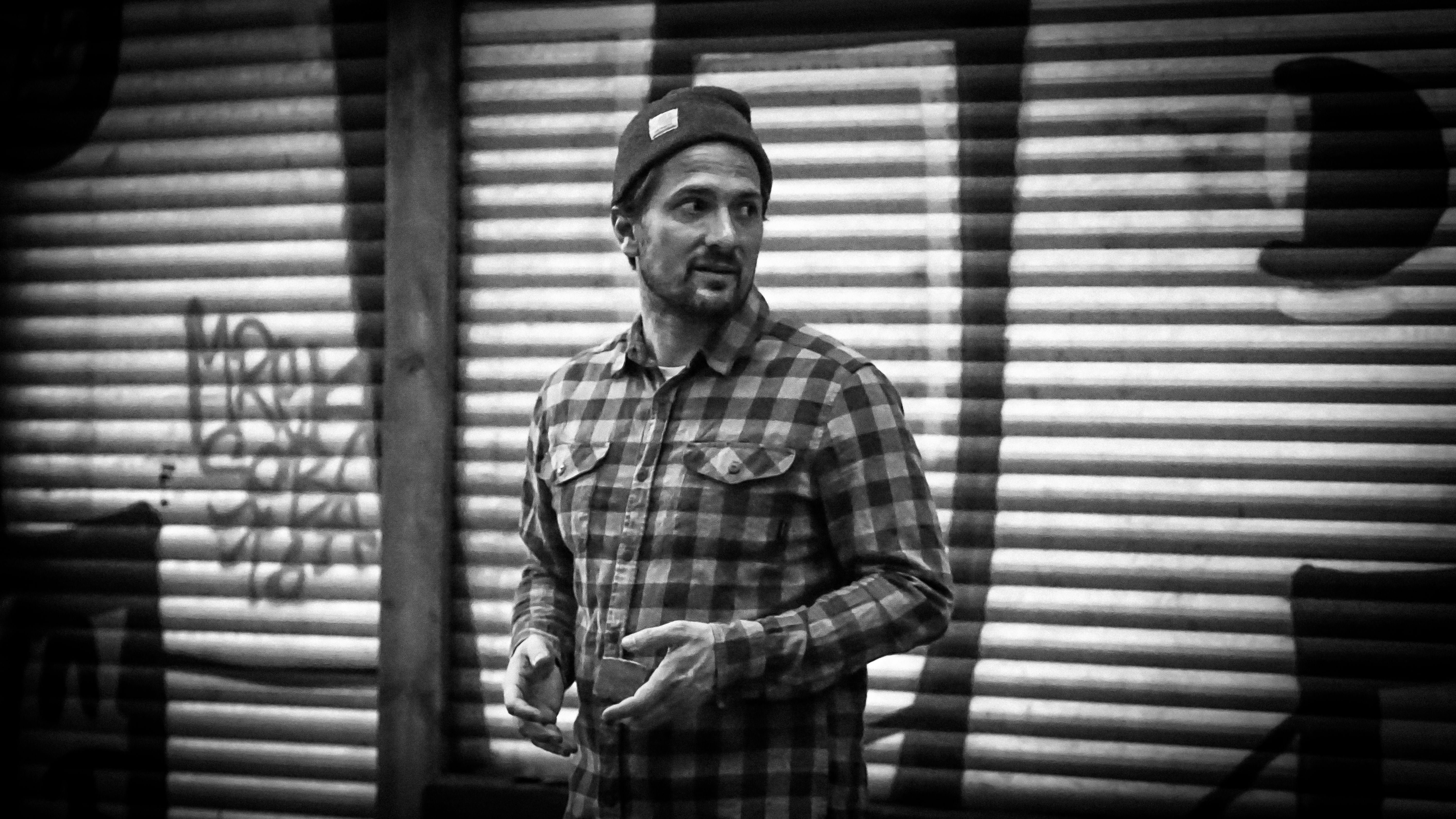 Pressefoto von Rhymin Simon